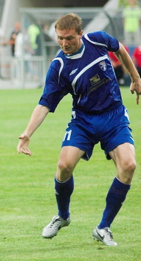 Антон Александрович Монахов — украинский футболист.